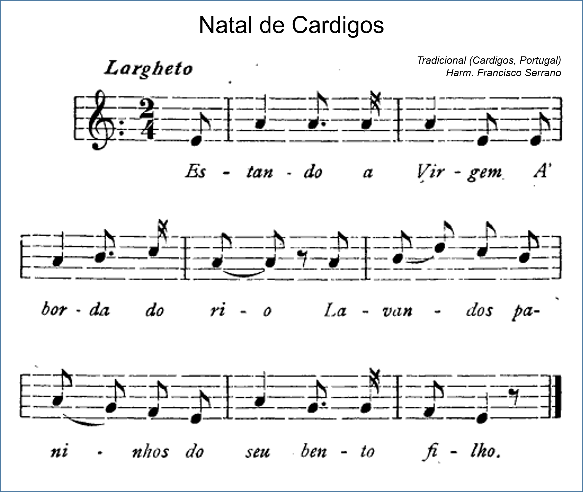 "Natal de Cardigos" ou "Canto do Natal" tal como foi transcrita por Francisco Serrano nos Romances e Canções Populares da Minha Terra em 1921.